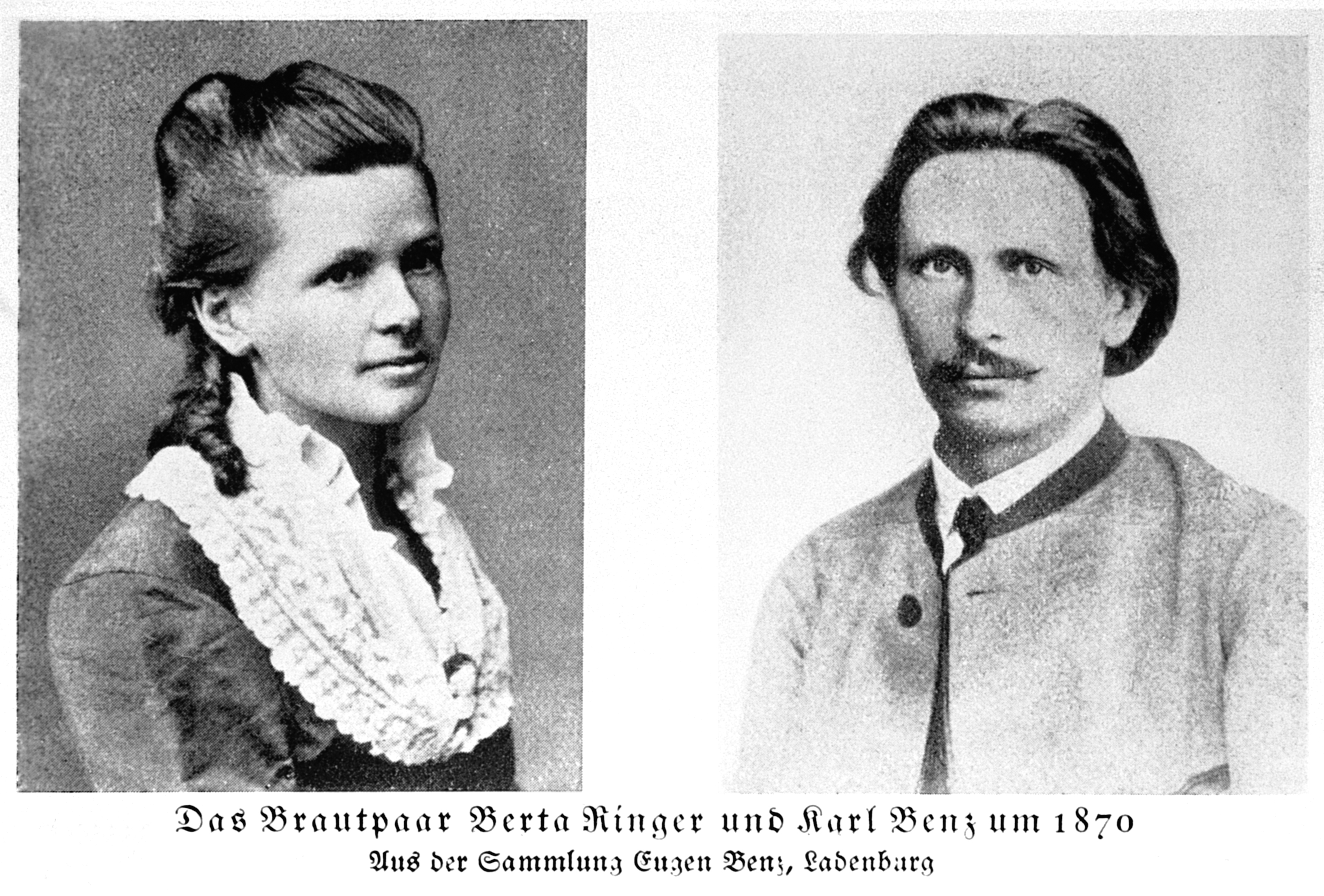 Bertha und Carl Benz